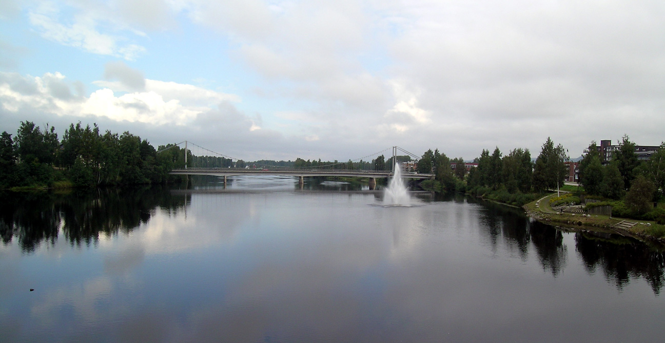 Glomma at Elverum, Hedmark.